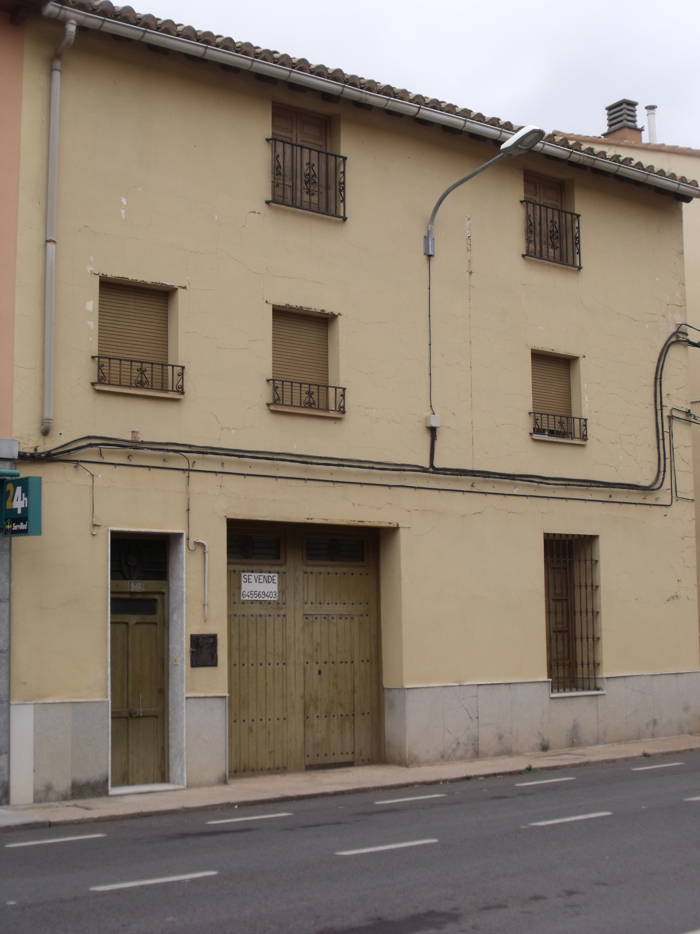 Uno de los tres edificios que hicieron las veces de hospital de sangre durante la guerra civil española.